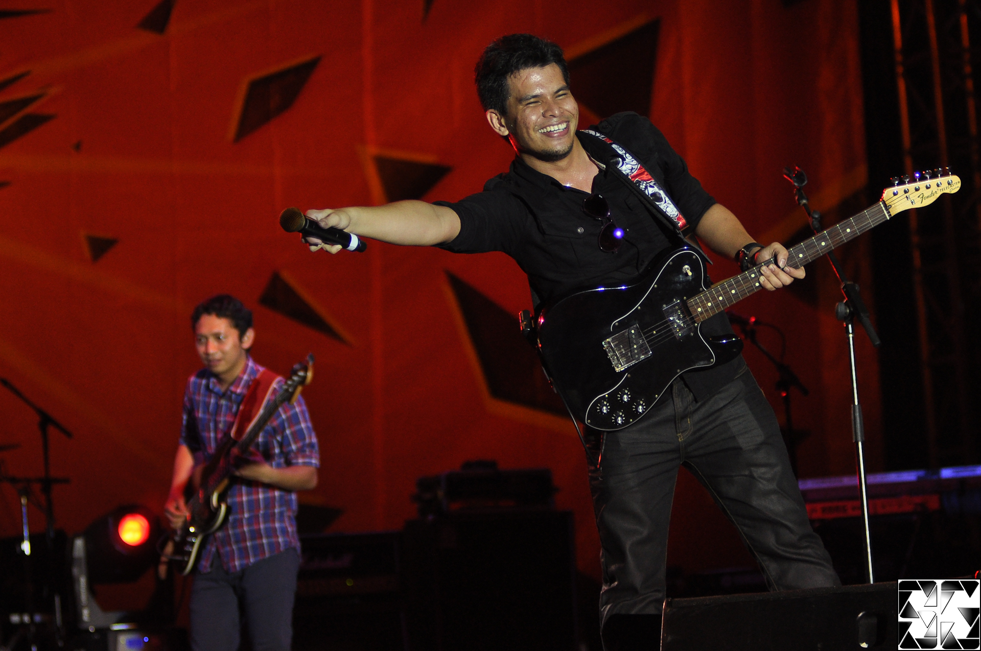 Pesawat di Konsert Twisties Bingit 2010